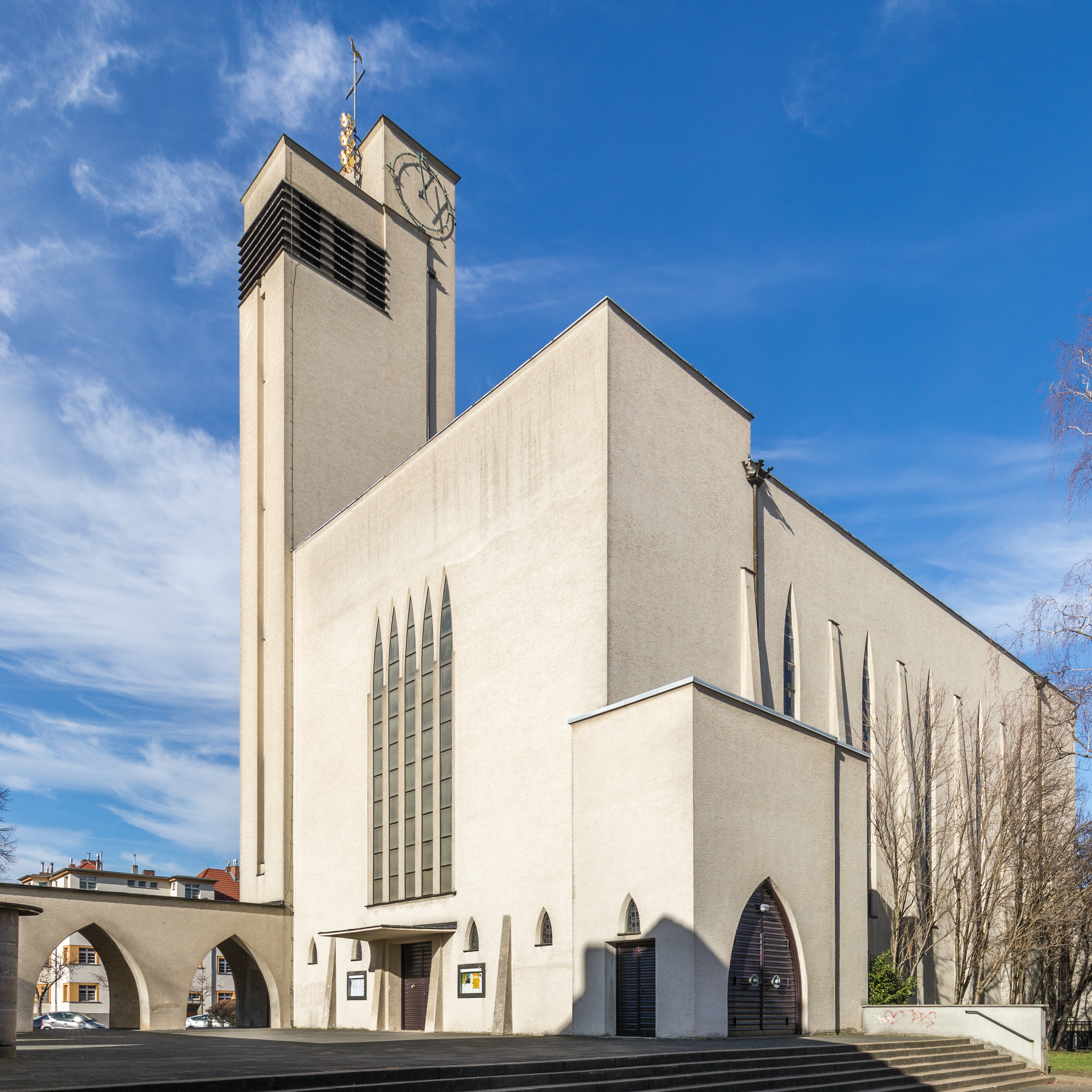 St. Dreikönigen, Köln-Bickendorf This is a photograph of an architectural monument.